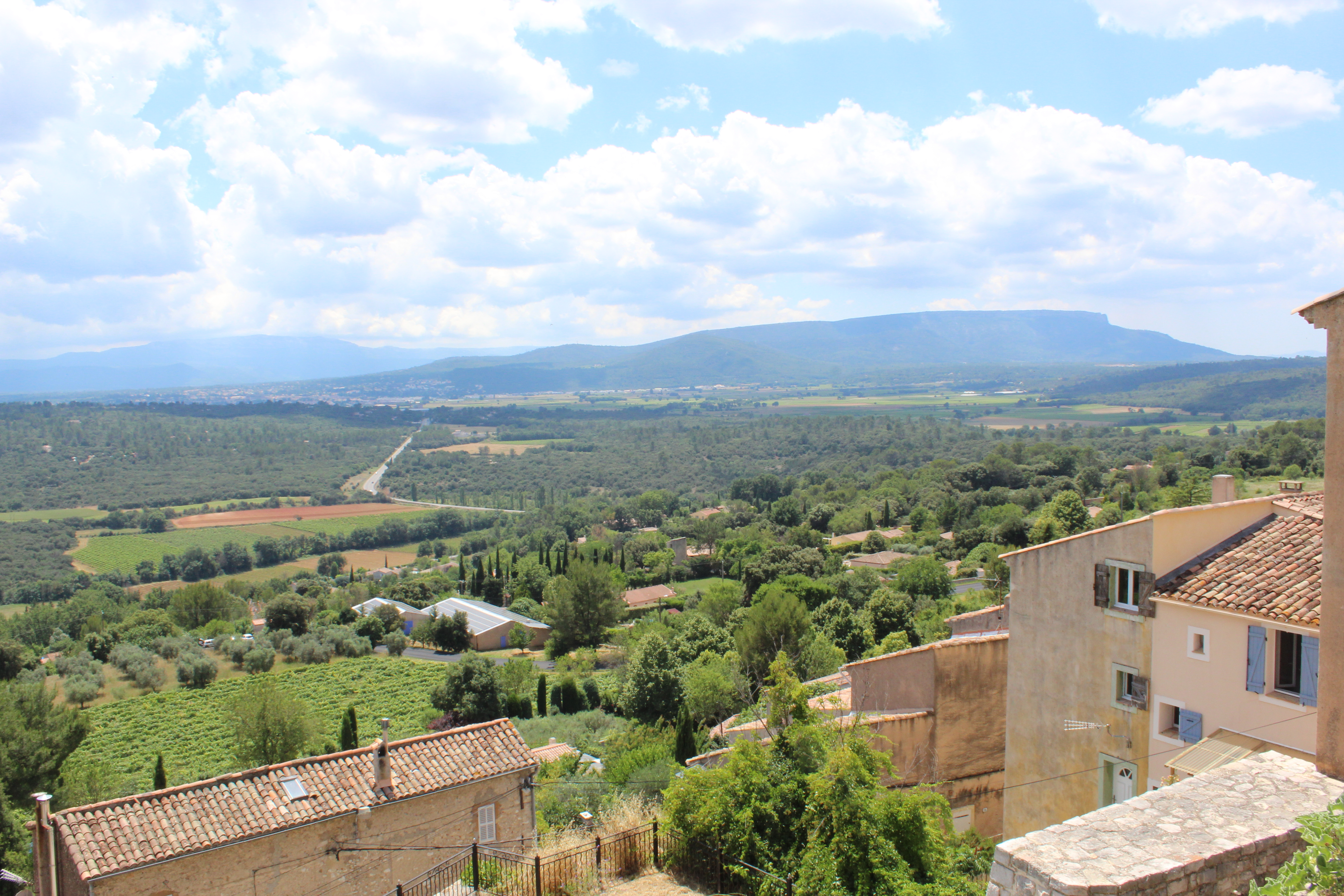 Vue de la Sainte-Baume